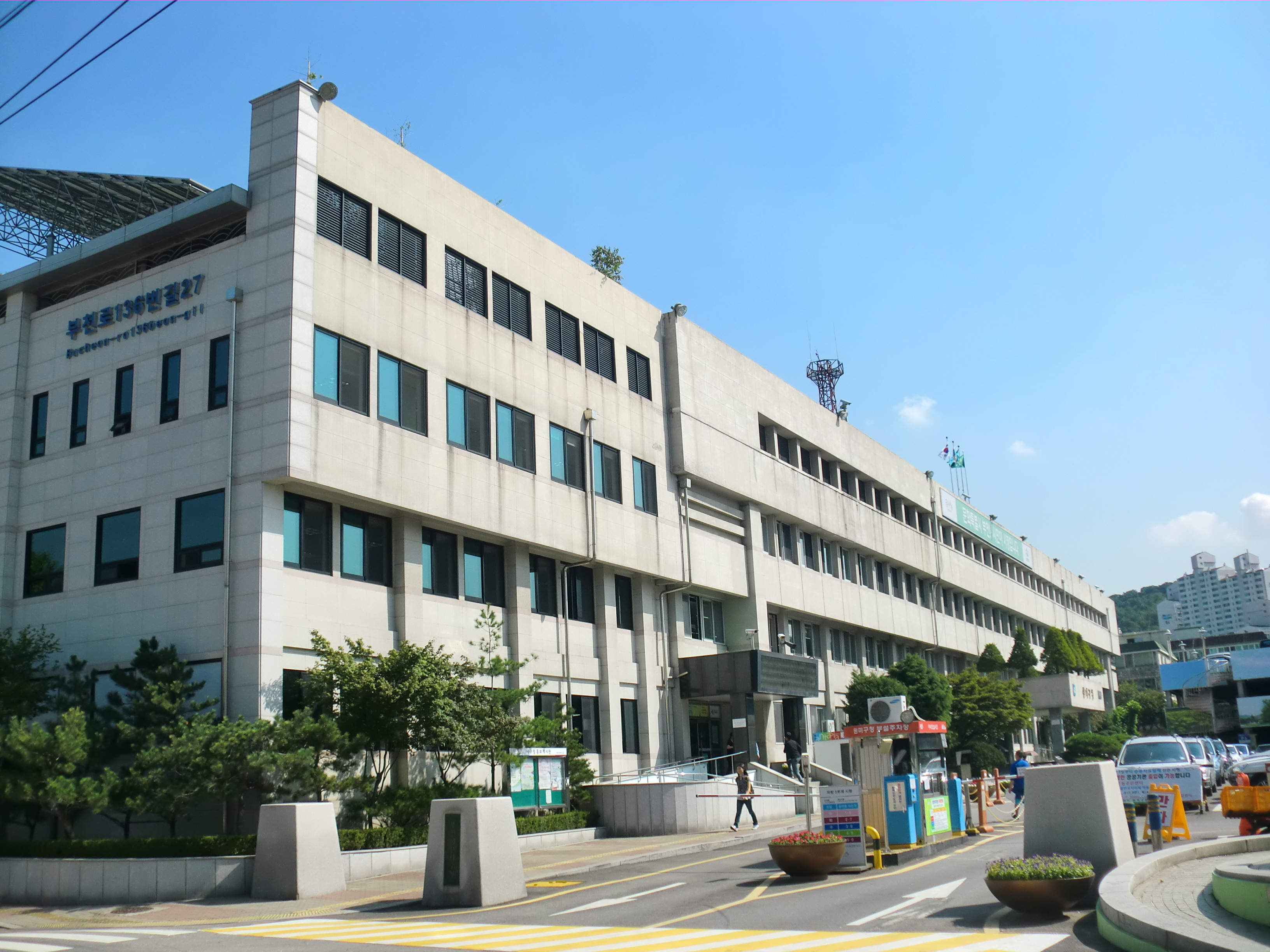 경기도 부천시에 있는 원미구청